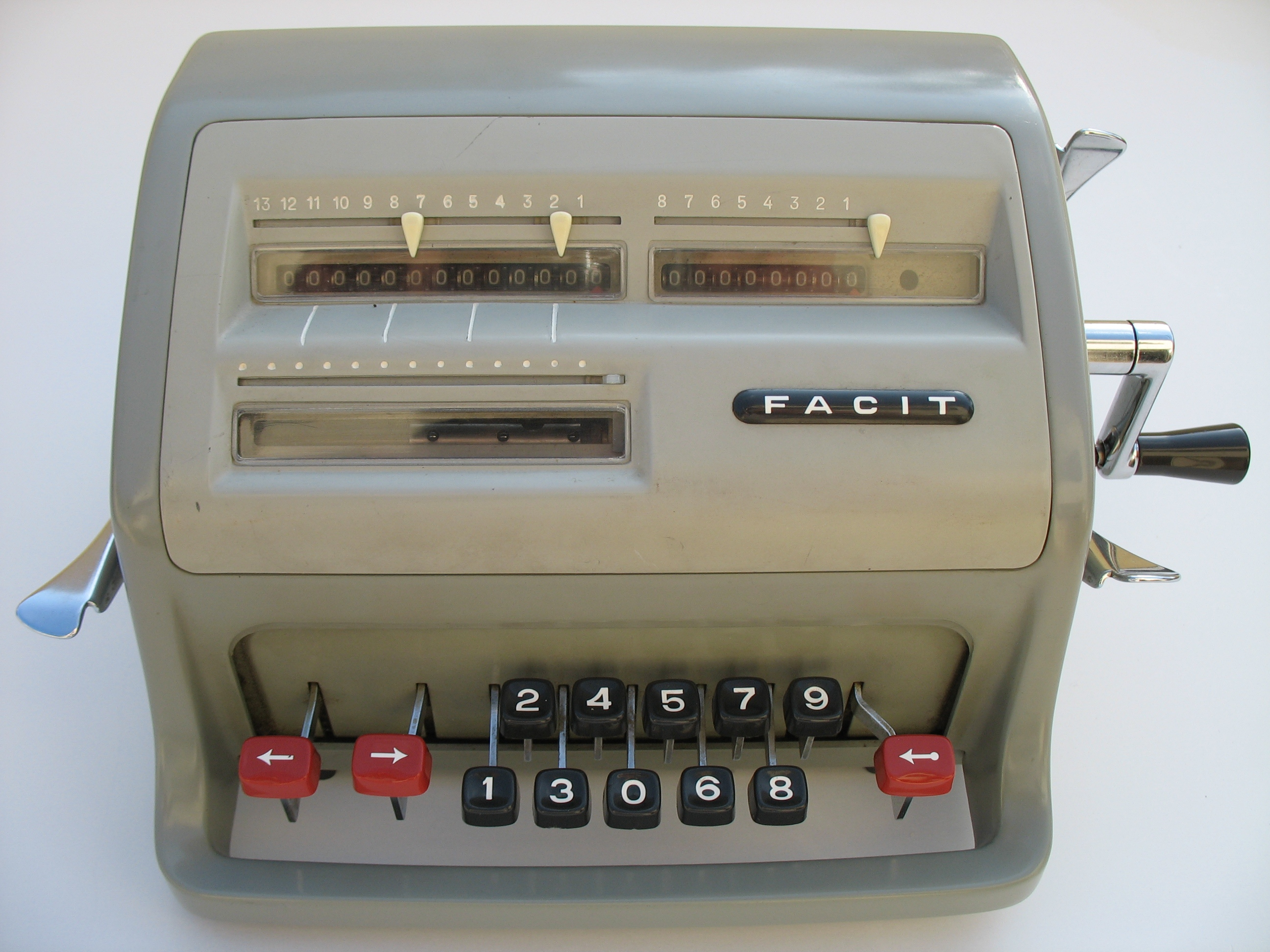 Calculatrice mécanique Facit GMBH, modèle C1-13